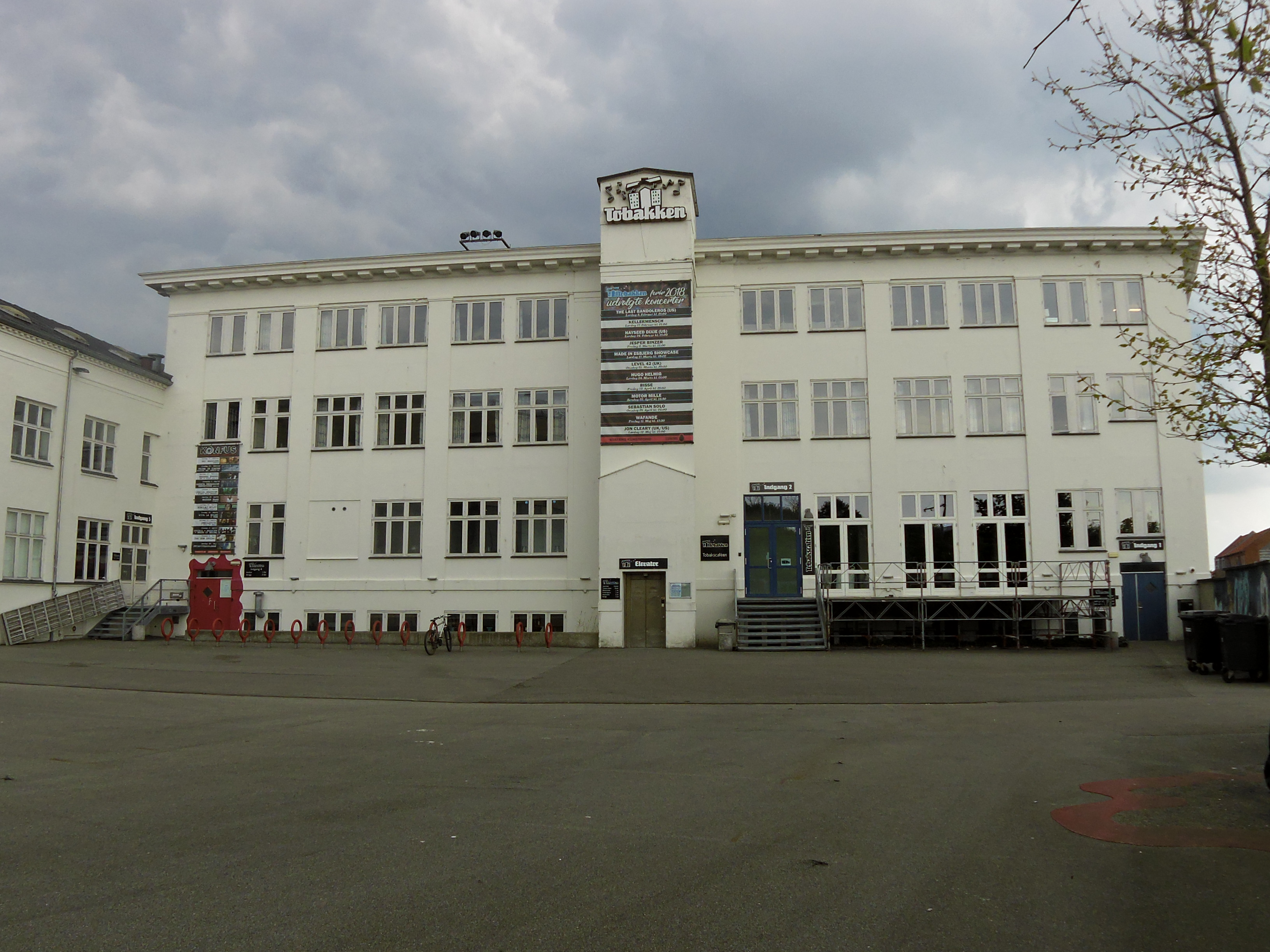 Tobakken Esbjerg